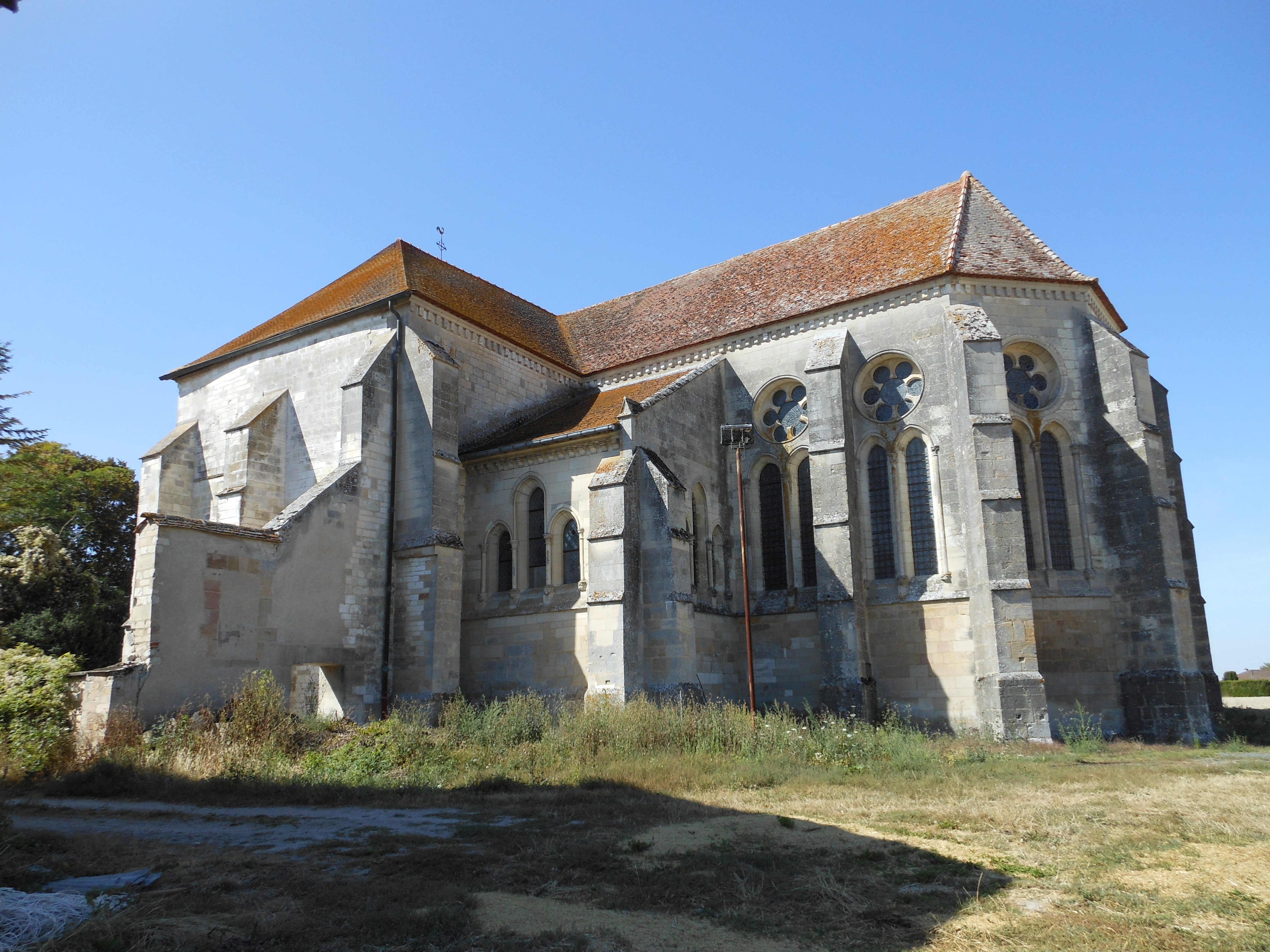 Église Sainte-Marguerite de Margerie-Hancourt, (Classé, 1862) .